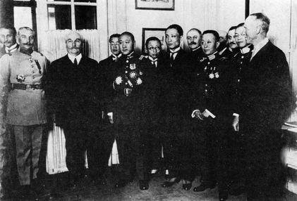 1925年4月，徐树铮访法时受到法国总统杜梅尔格（左二）的接见。